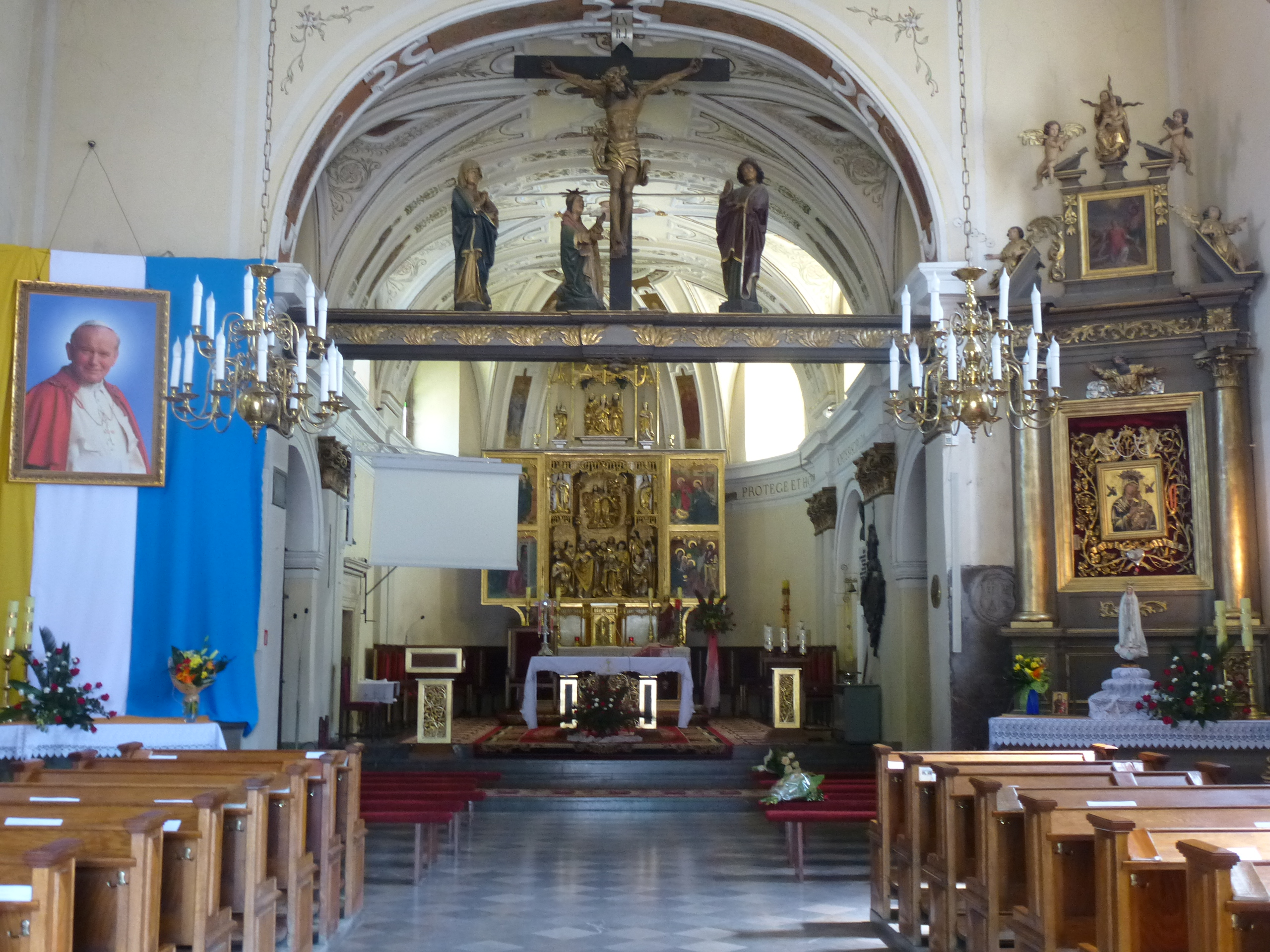 Książnice Wielkie - rzymskokatolicki kościół parafialny pw. Wniebowzięcia NMP, 1673-1680, 1864 (nawa główna)